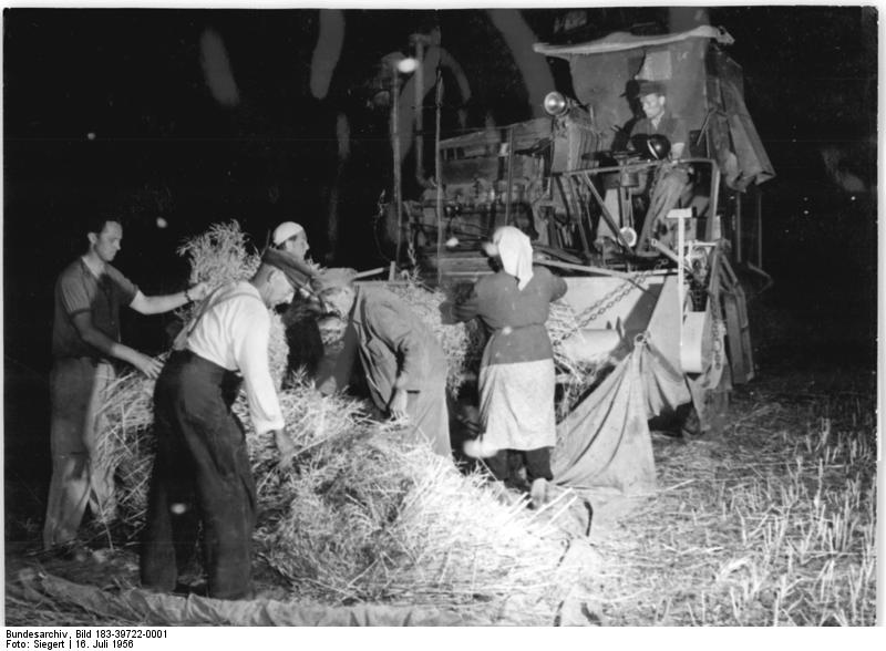 Nickritz, Nachtarbeit, Dreschen Zentralbild Siegert-Weiß-Qu-1839.A.-V. 16.7.1956 - LPG Nickritz-Ölsitz drischt auch nachts - Die LPG Nickritz-Ölsitz im Kreis Riesa führt den Nockendrusch von Raps auch nachts durch. Um den Körnerverlust zu verringern, ist vor dem entsprechend hergerichteten Mähdrescher der MTS Nünchritz ein Segeltuch ausgelegt.